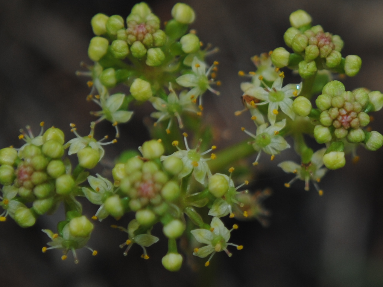 Hydrocotyle bonariensis. Araliaceae. Fotos tomadas en margen de laguna cercana al dique de la Represa Constitución, departamento de Río Negro, Uruguay.